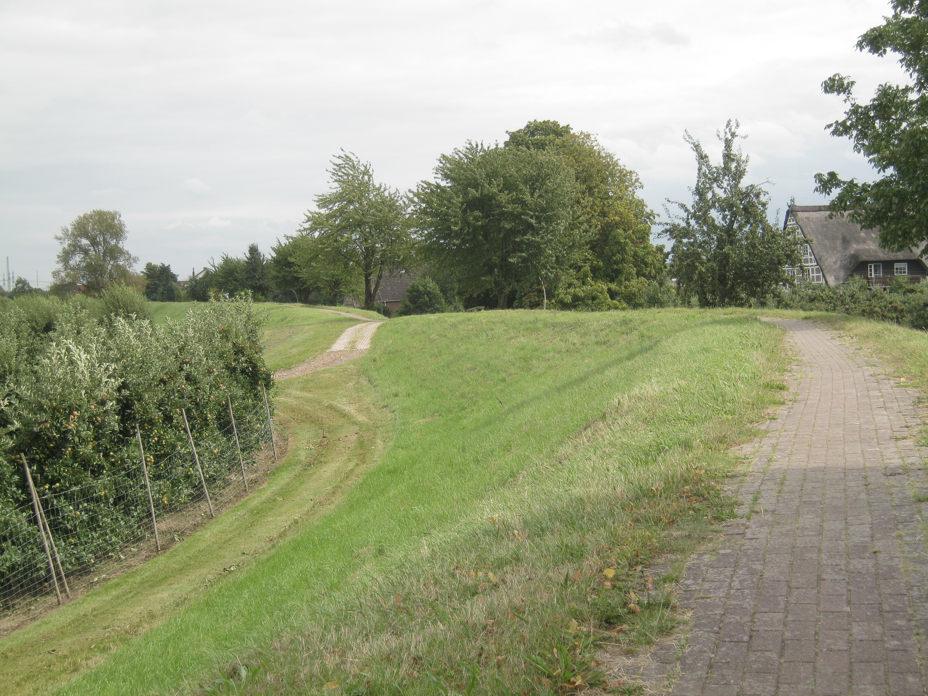 Deich neben der Hohenwischer Straße in Hamburg-Francop.